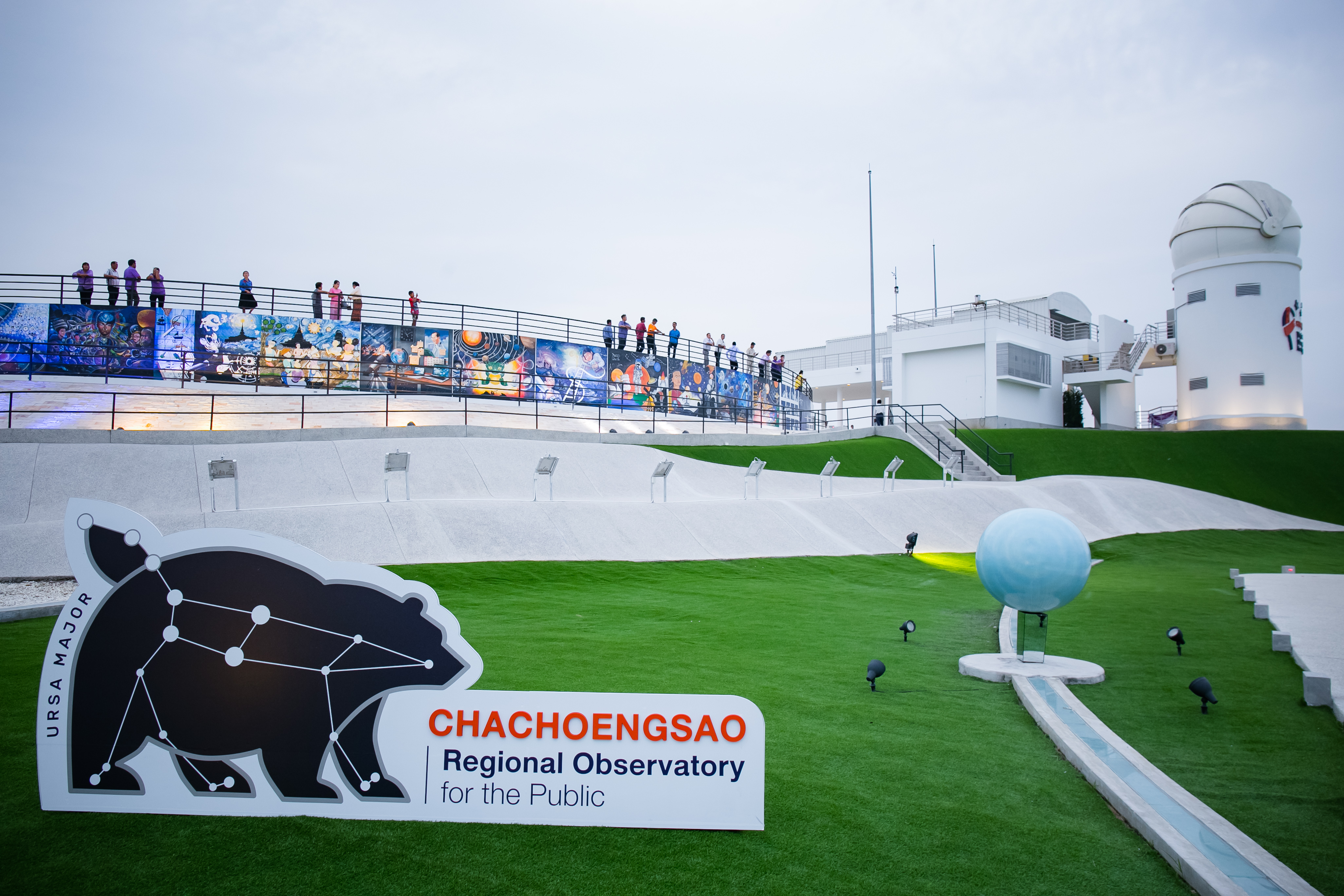 หอดูดาวเฉลิมพระเกียรติ 7 รอบ พระชนมพรรษา ฉะเชิงเทรา ต. วังเย็น อ. แปลงยาว ฉะเชิงเทรา